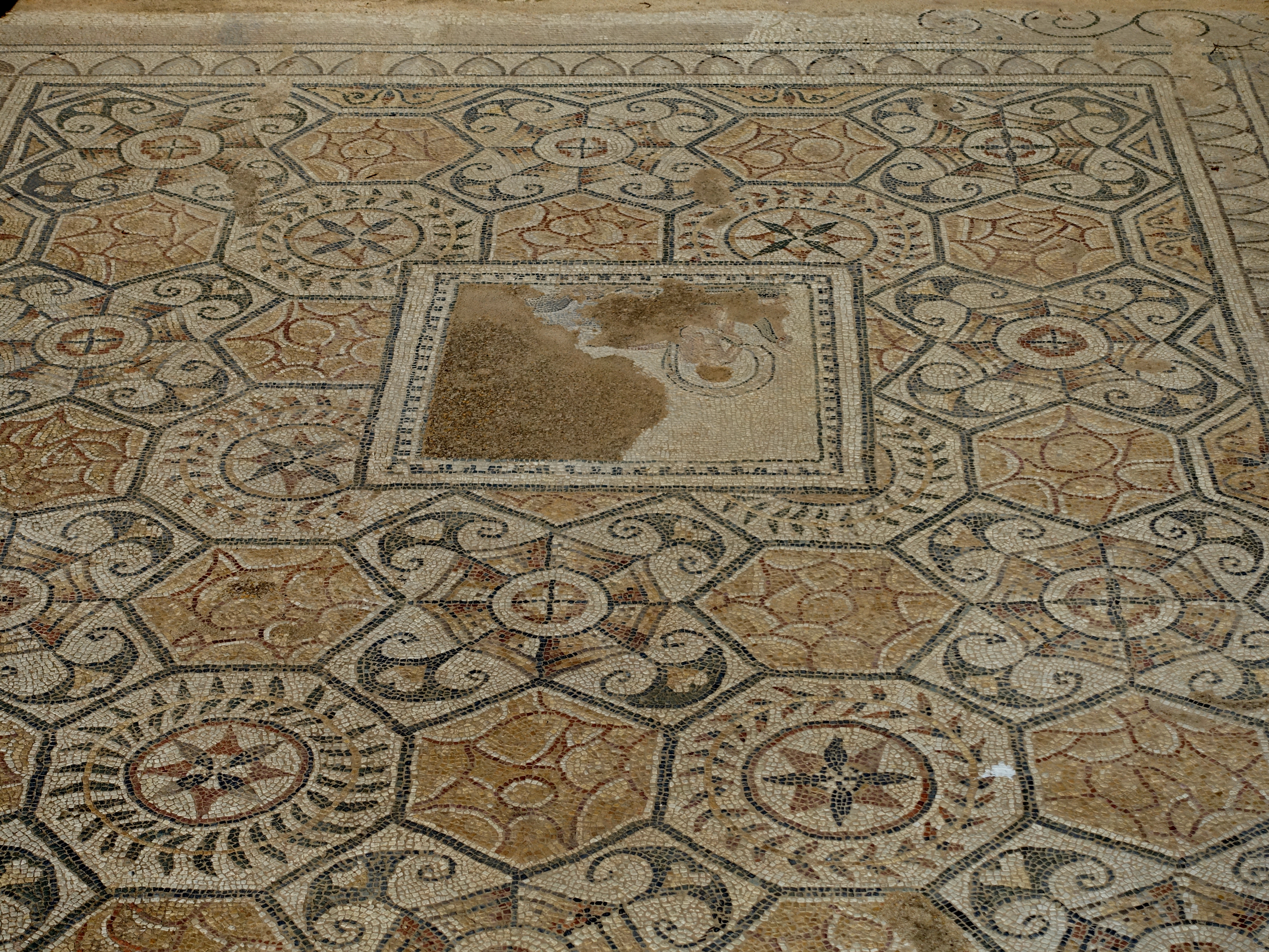 Archäologische Ausgrabungsstätte von Nora, Gemeinde Pula, Sardinien, Italien